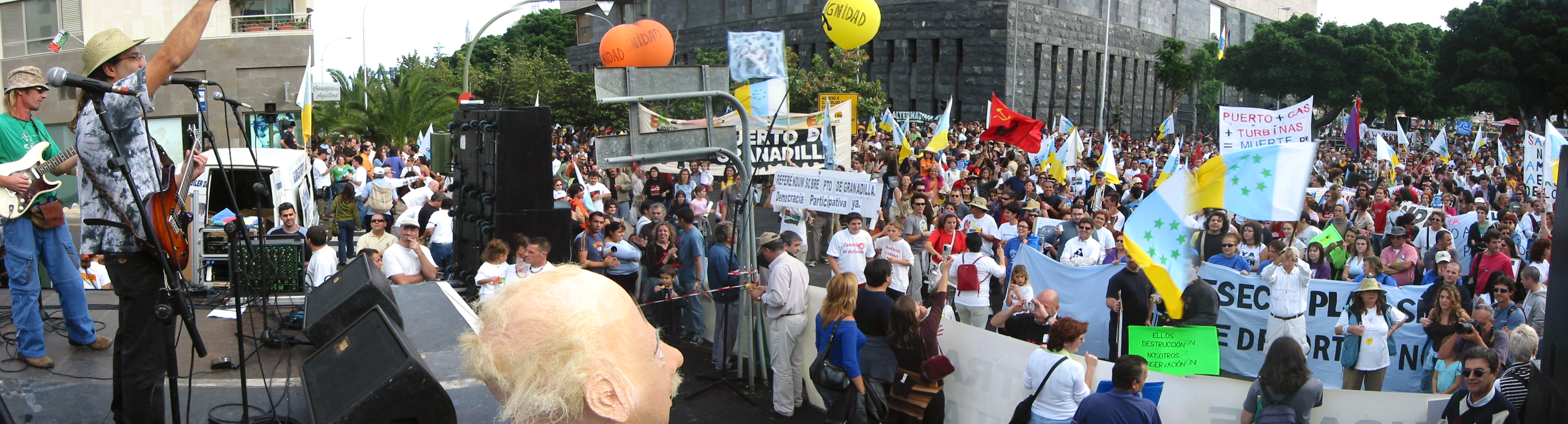 Concierto de cierre de manifestación contra el Puerto de Granadilla. Santa Cruz de Tenerife, noviembre 2005.